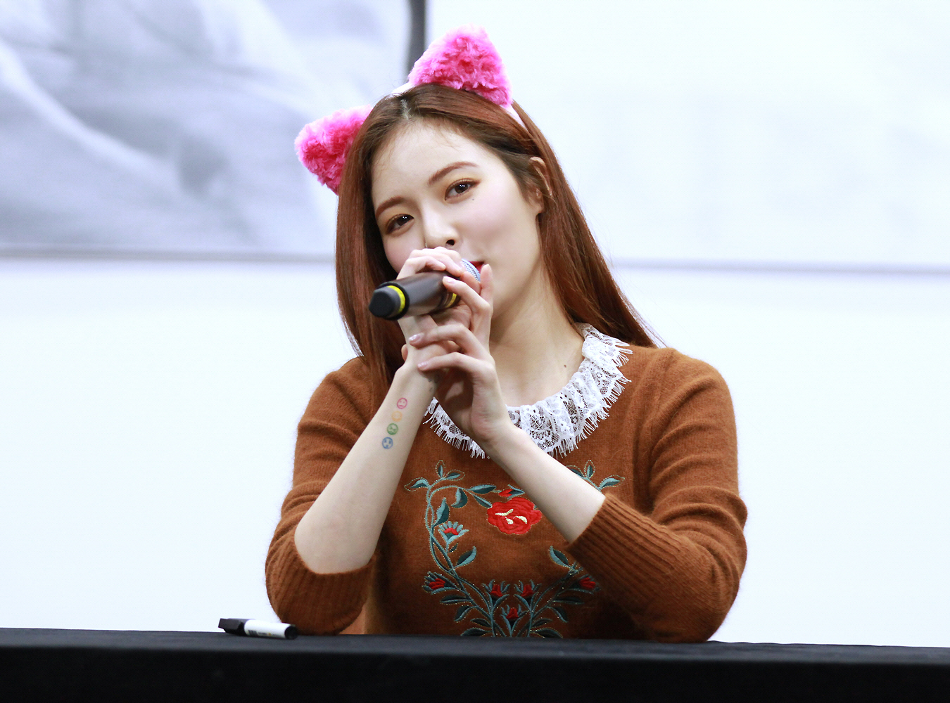 170917 대전 신나라 팬사인회 현아 직찍